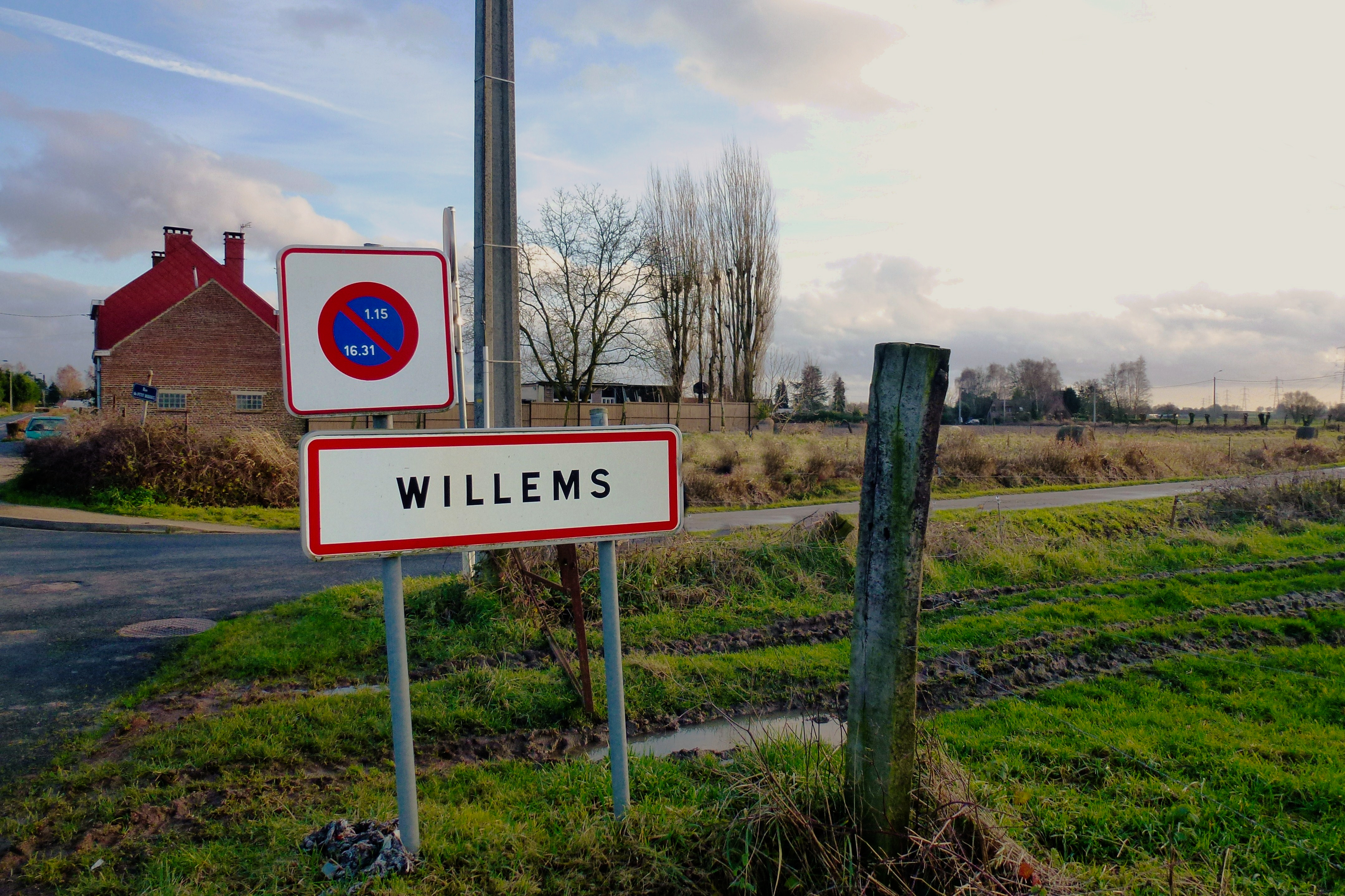 Panneau d'entrée Willems dans le Nord Nord-Pas-de-Calais.- France.